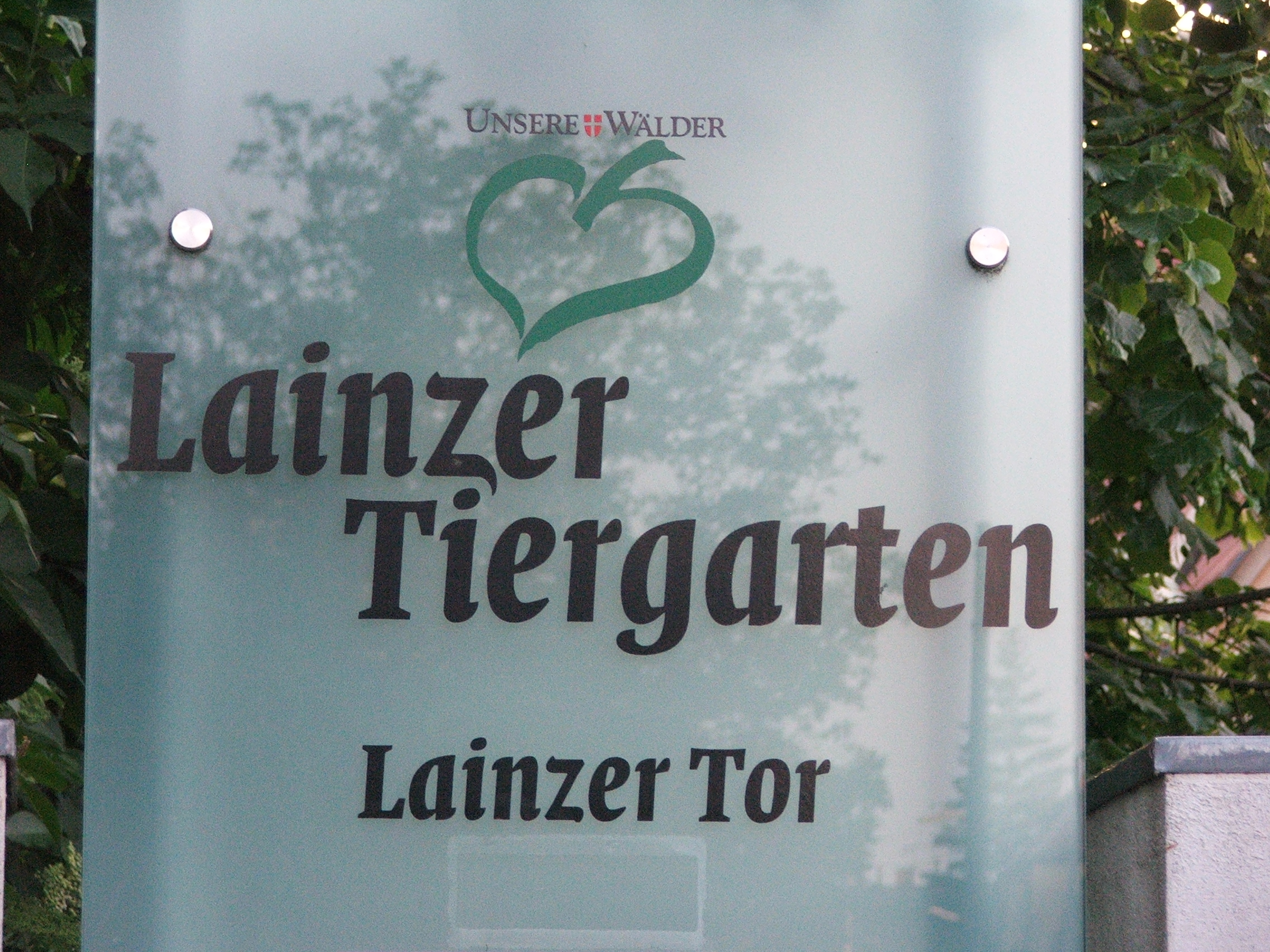 Lainzer Tor, Lainzer Tiergarten, Vienna